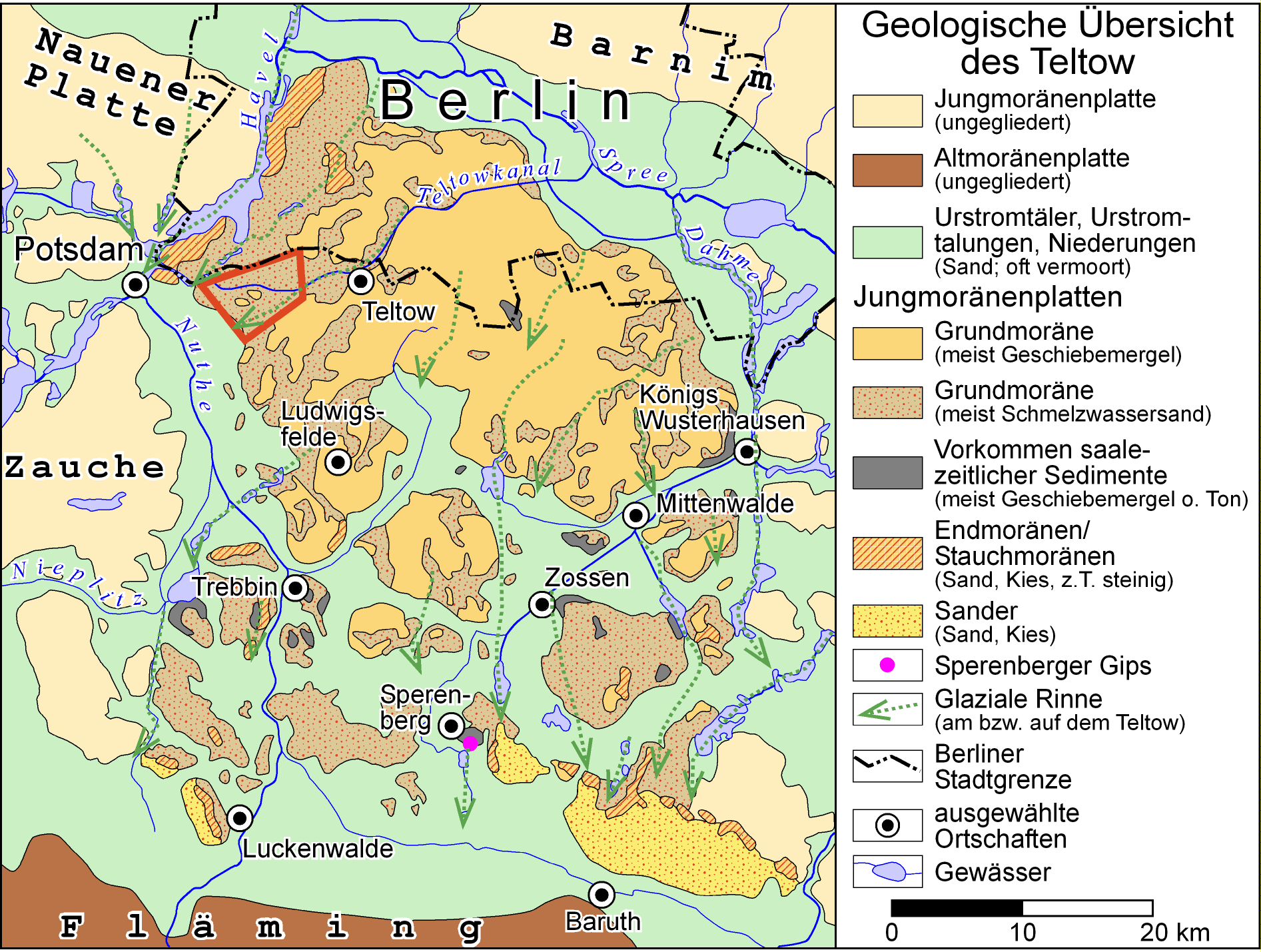 Geologische Übersichtskarte des Teltow mit Parforceheide (rot eingerahmt)